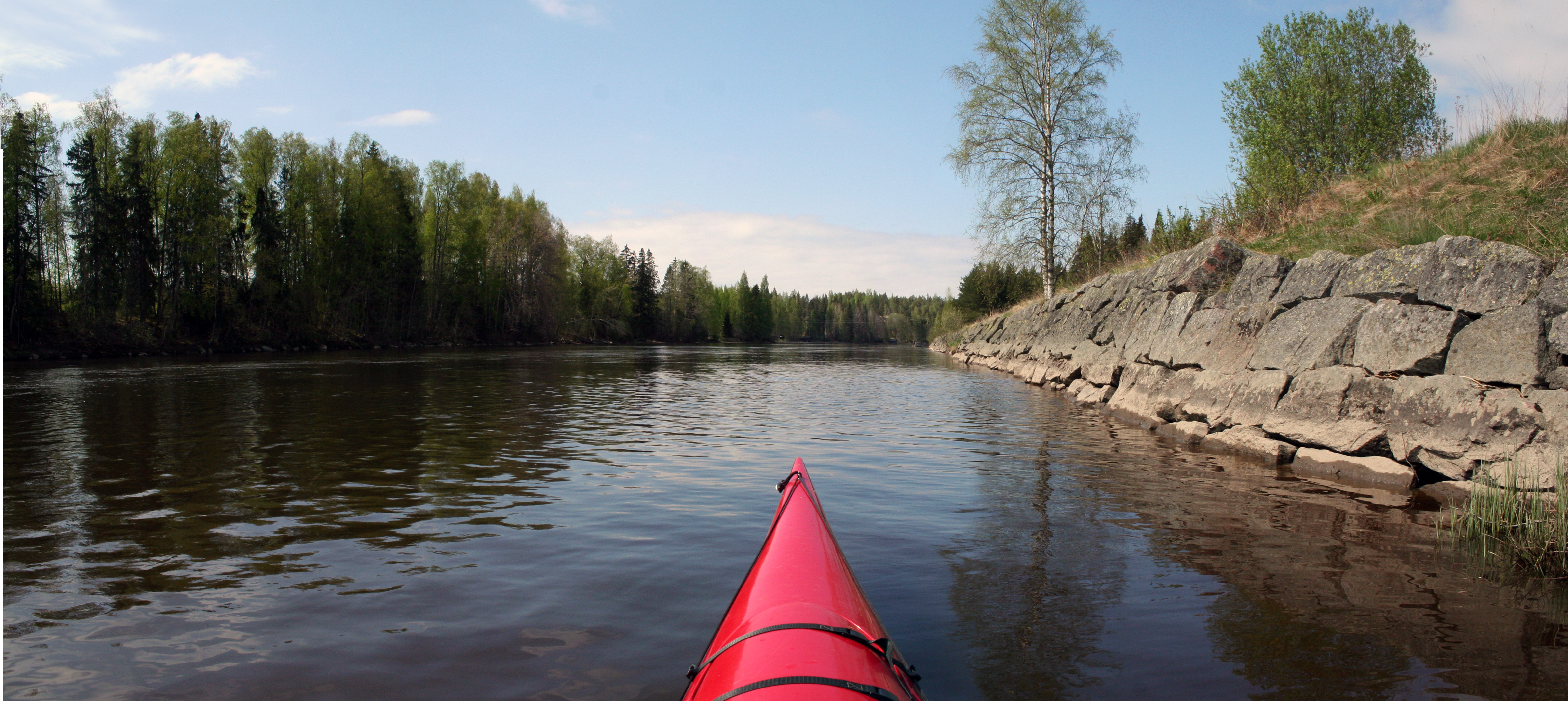 Kokemäenjoen penkat on vahvistettu kivreunuksin monissa kohdissa, kuten tässä Kiettareen kylän kohdalla.